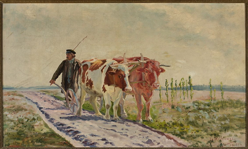 И. Врублевский. Волы в упряжке